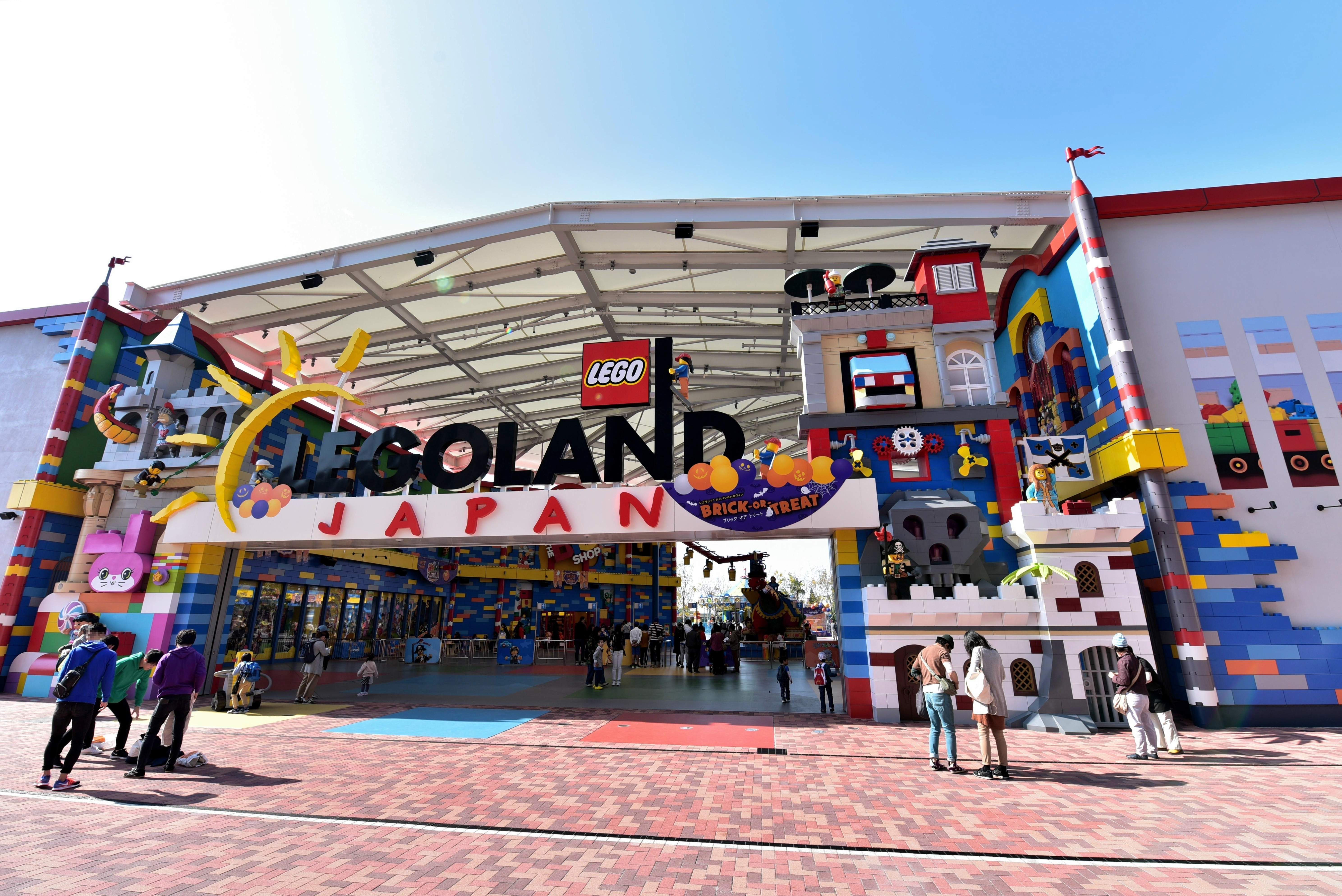 レゴランド・ジャパン正面入り口